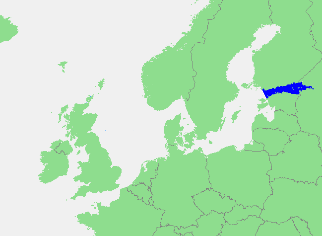 Finse Golf